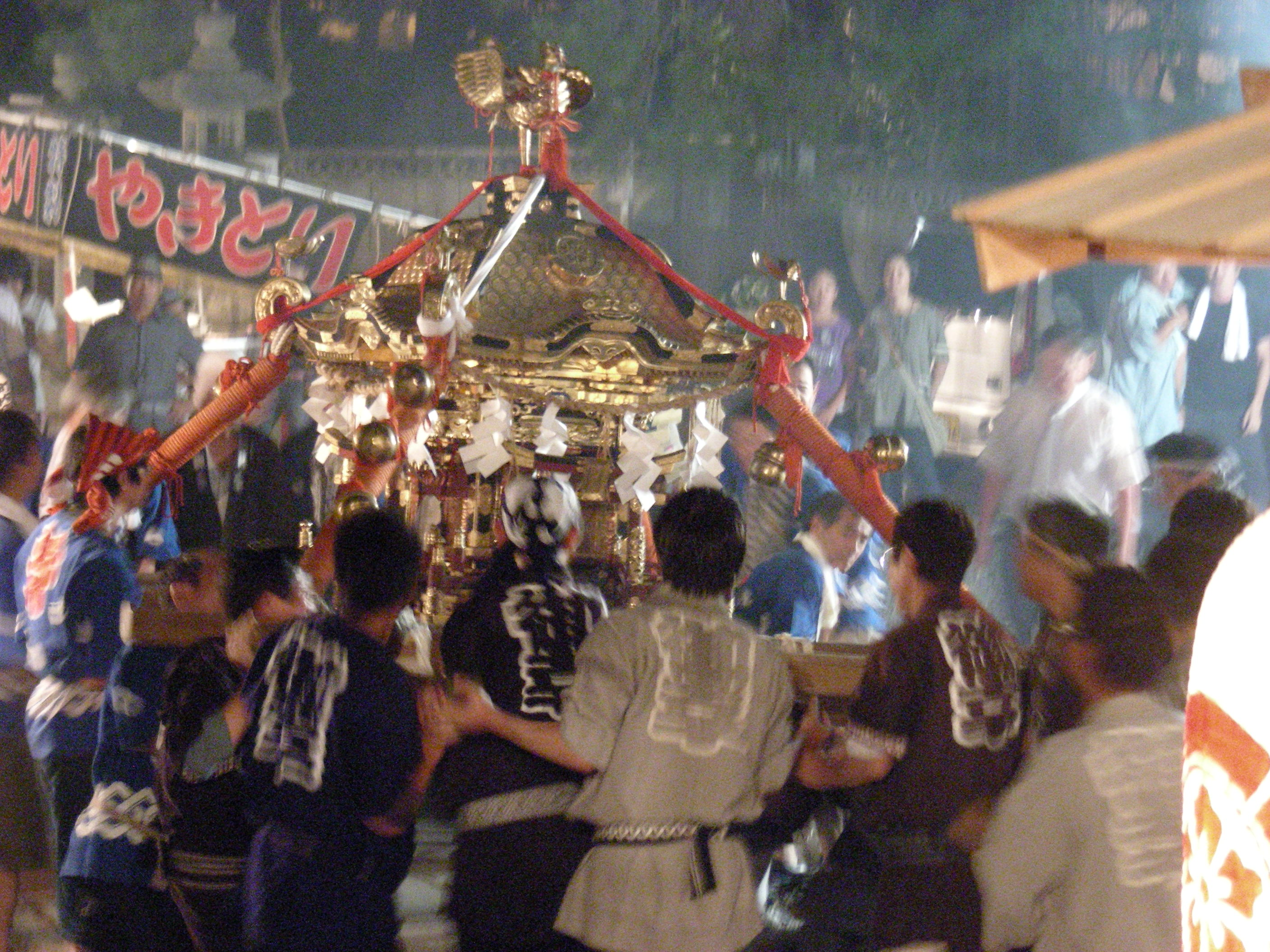 直江津祇園祭・還御祭の様子